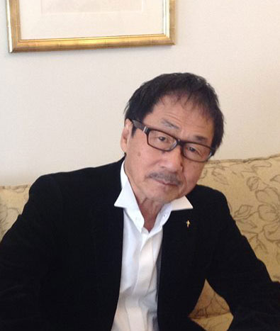 コピーライター岩永嘉弘